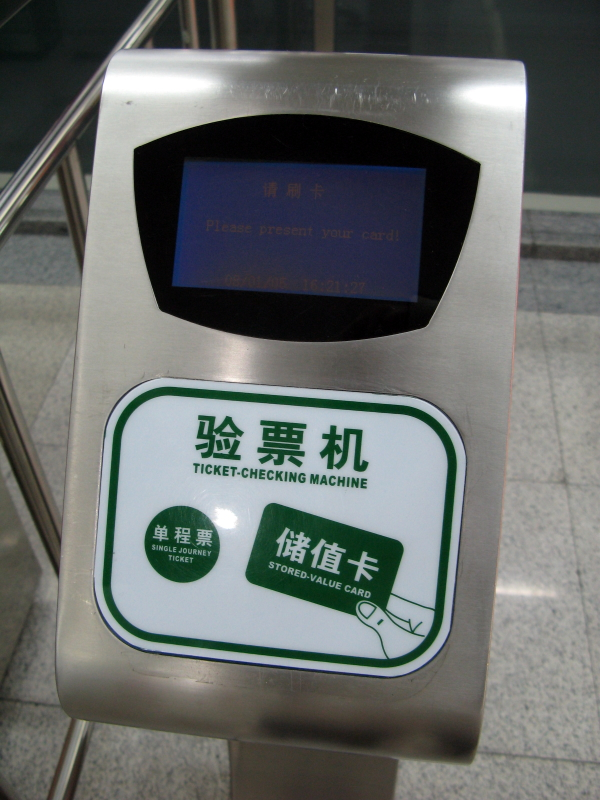 ShenZhen Metro Ticket Checking Machine